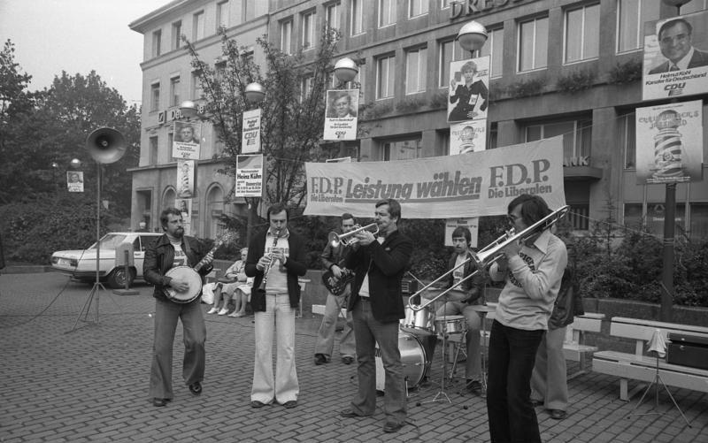 Wahlkampfreise des FDP-Vorsitzenden und Bundesministers Hans-Dietrich Genscher zur Bundestagswahl am 3.10.1976